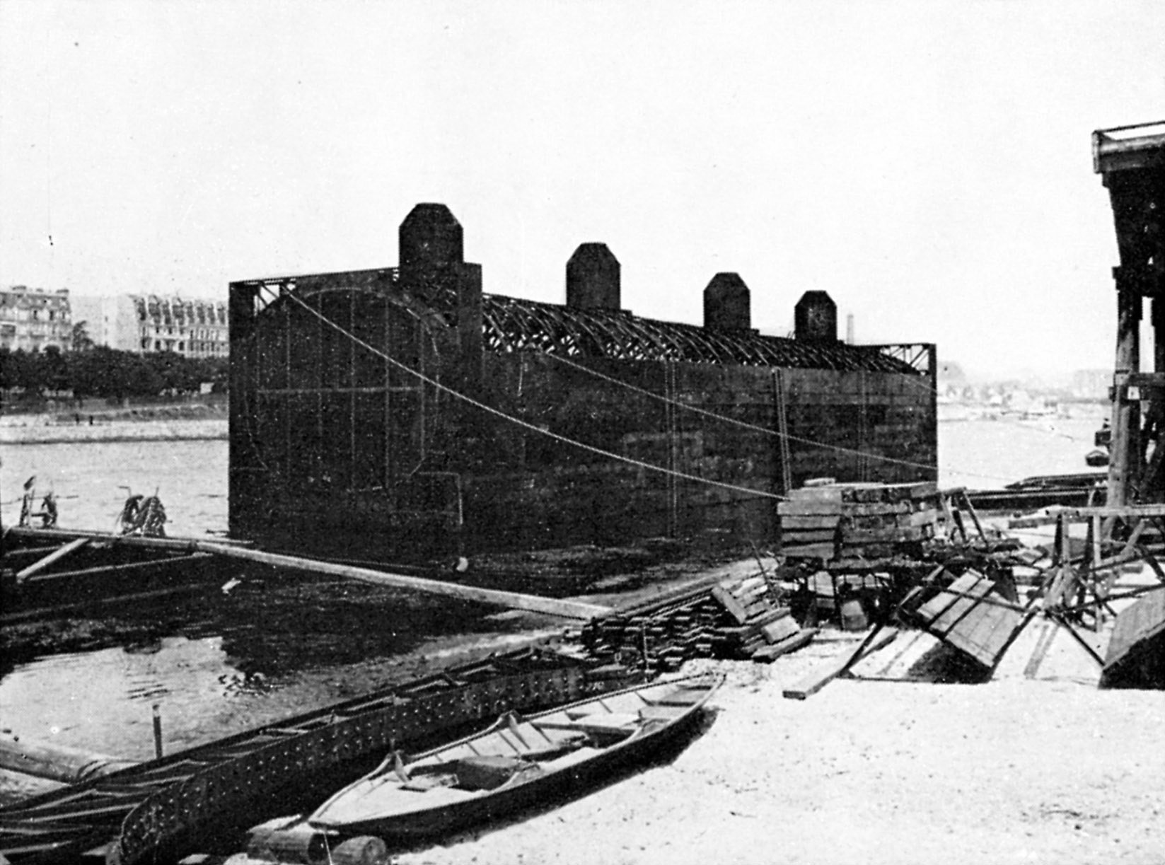 Les travaux de la ligne 8 du métro de Paris (actuelle ligne 10), France